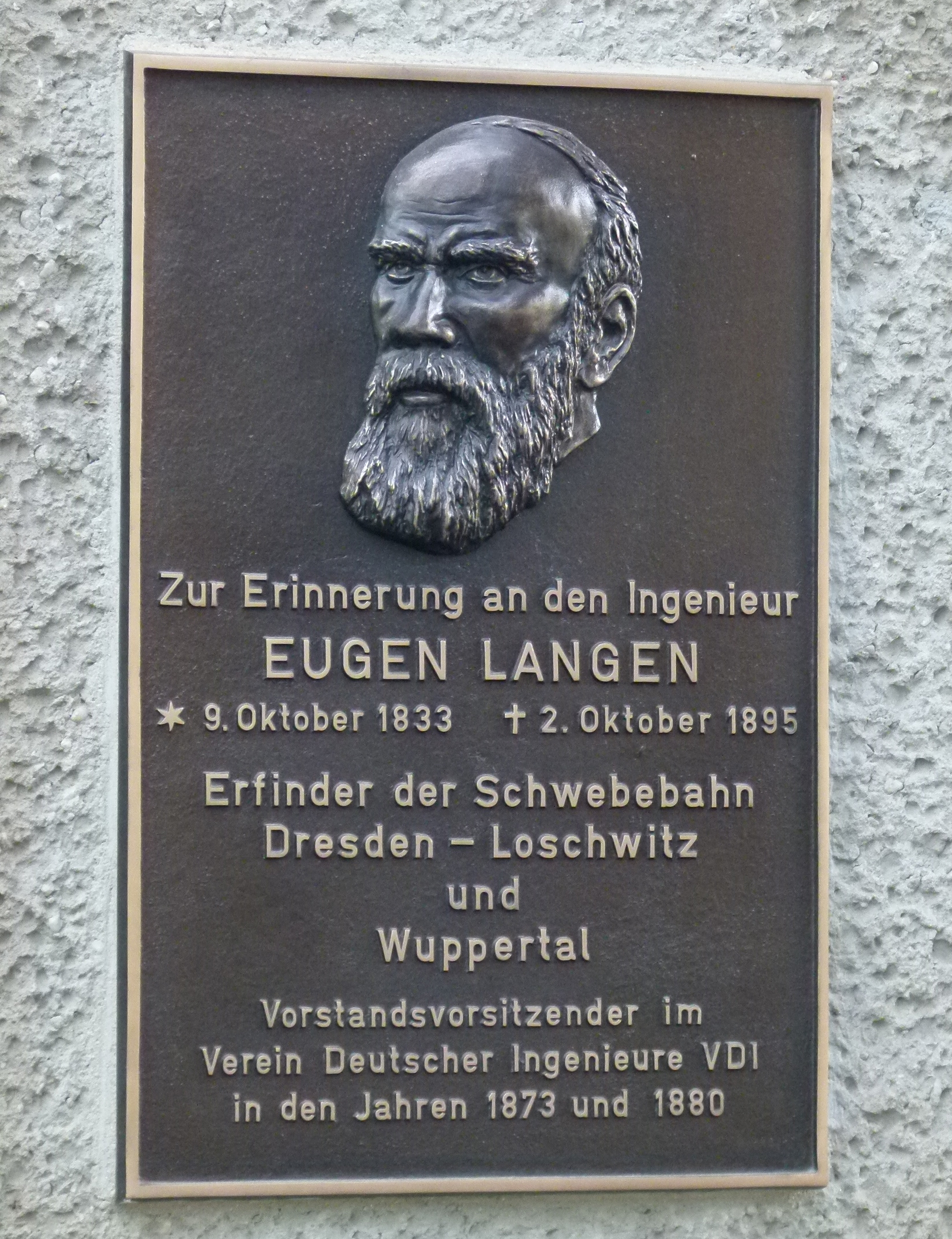 Gedenktafel für Eugen Langen in der Talstation der Schwebebahn Dresden